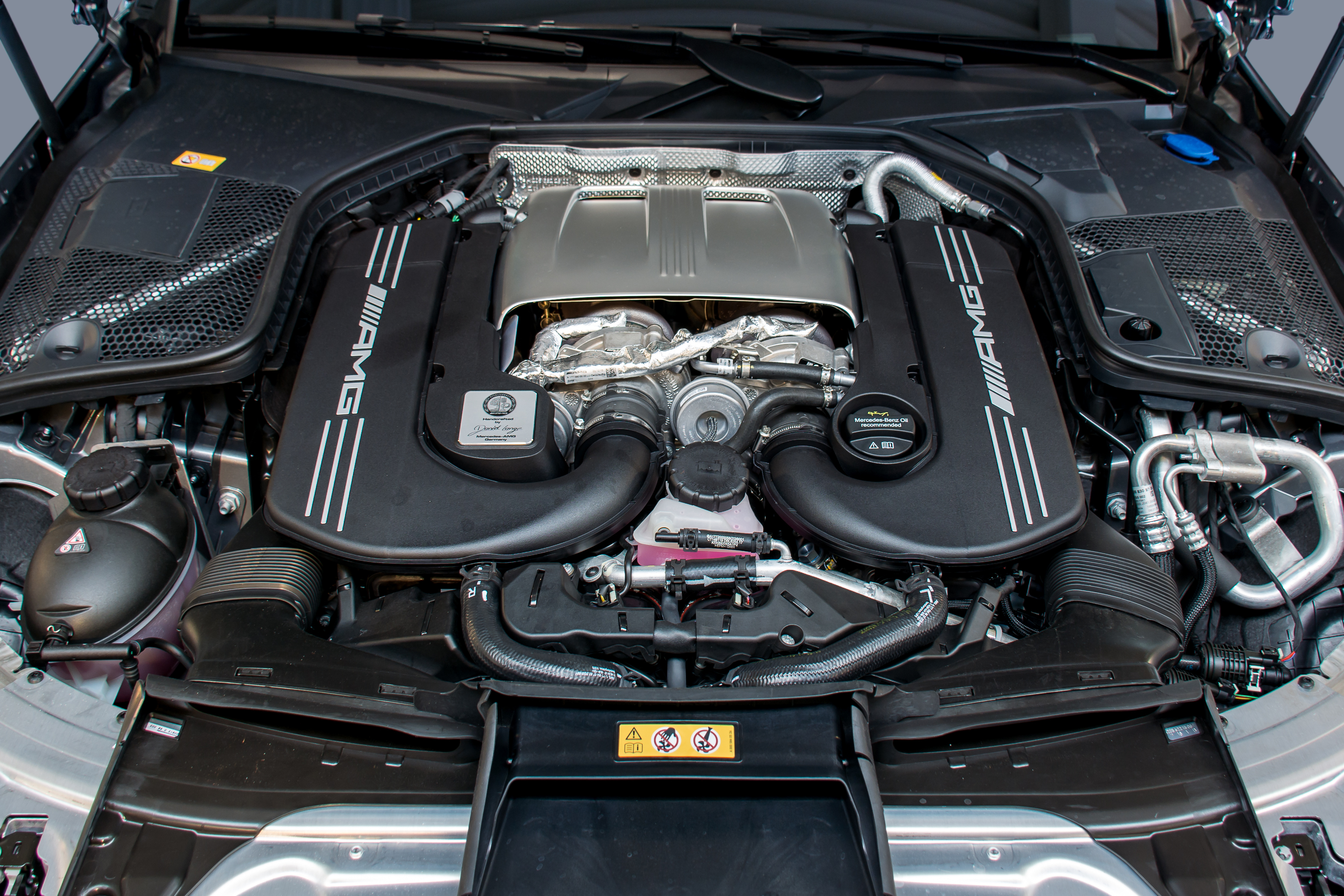 Mercedes-AMG Motor 177 im Typ 205, aufgenommen in der Mercedes-Benz Niederlassung in Schwäbisch Gmünd.